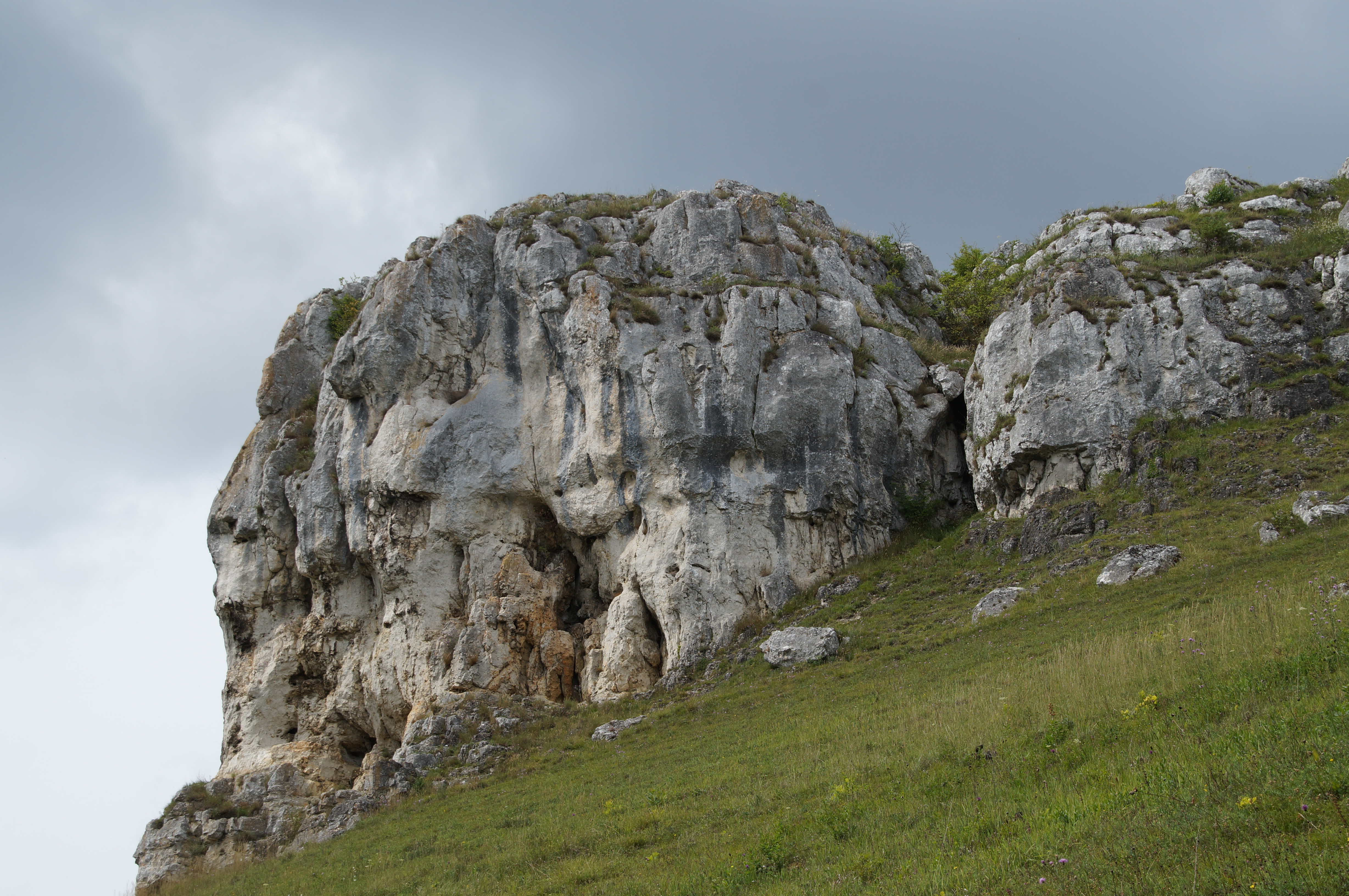 Felsformation am Jurasteig - Gelber Fels bei Eilsbrunn - Teilstrecke Alpiner Steig - zwischen Eilsbrunn und Schönhofen. Geotop Nr: 375R018